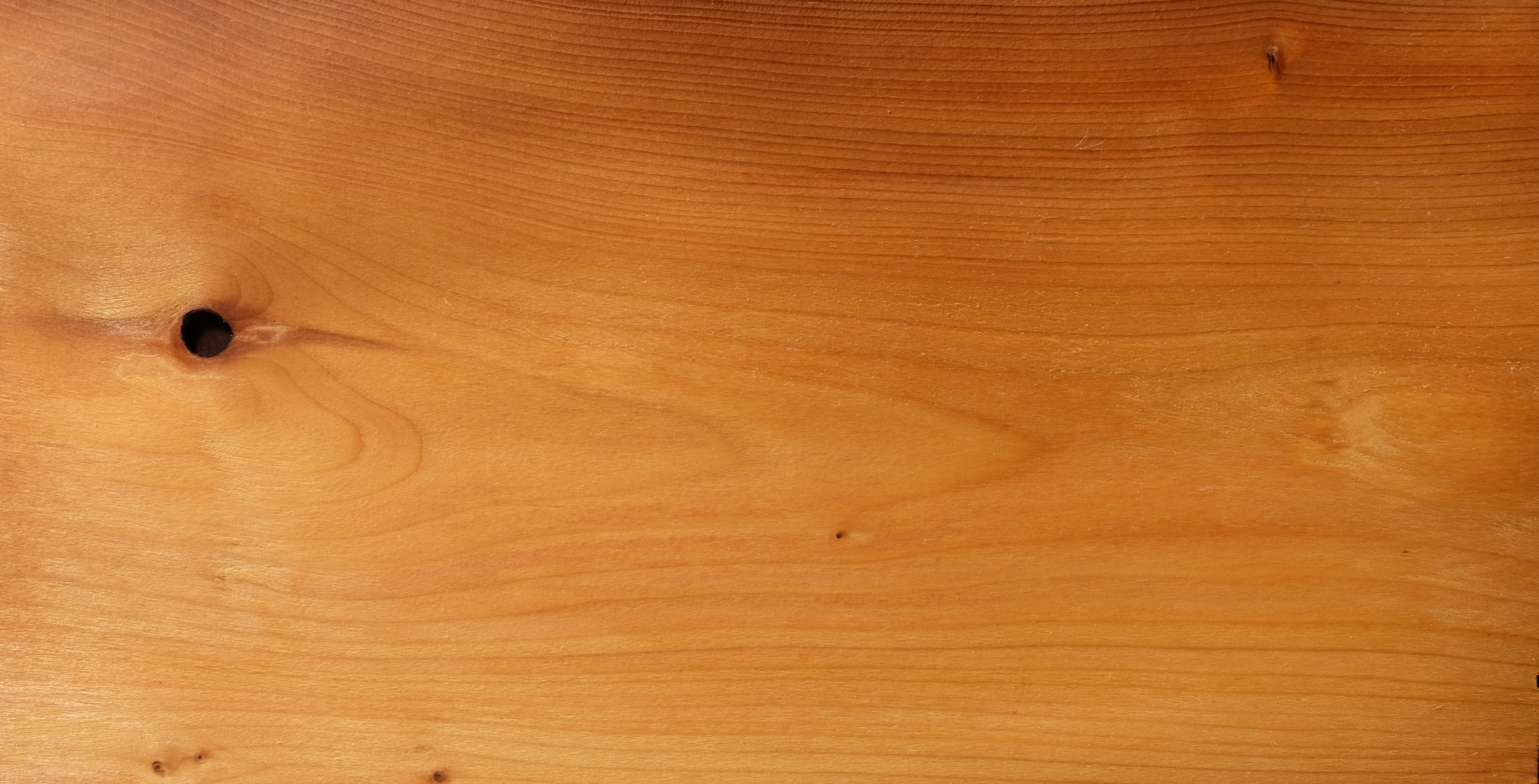 gemessertes Furnier; Holzart: EIB, Eibe, Yew, Ibe, Tasso